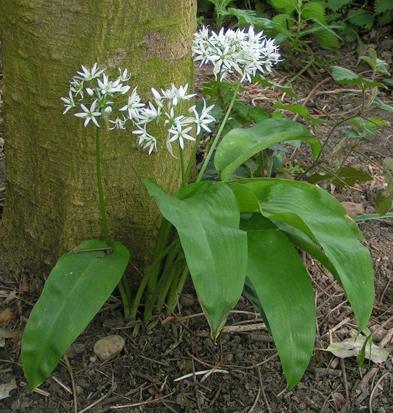 Bärlauch, Allium ursinum. Foto von sannse, 24 April 2004, Essex, England. Hochgeladen in en.wp